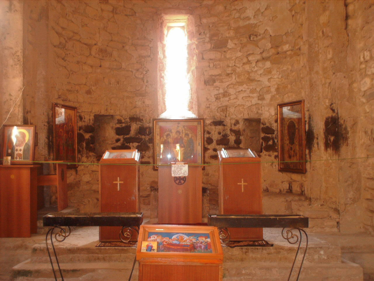 Храм изнутри.